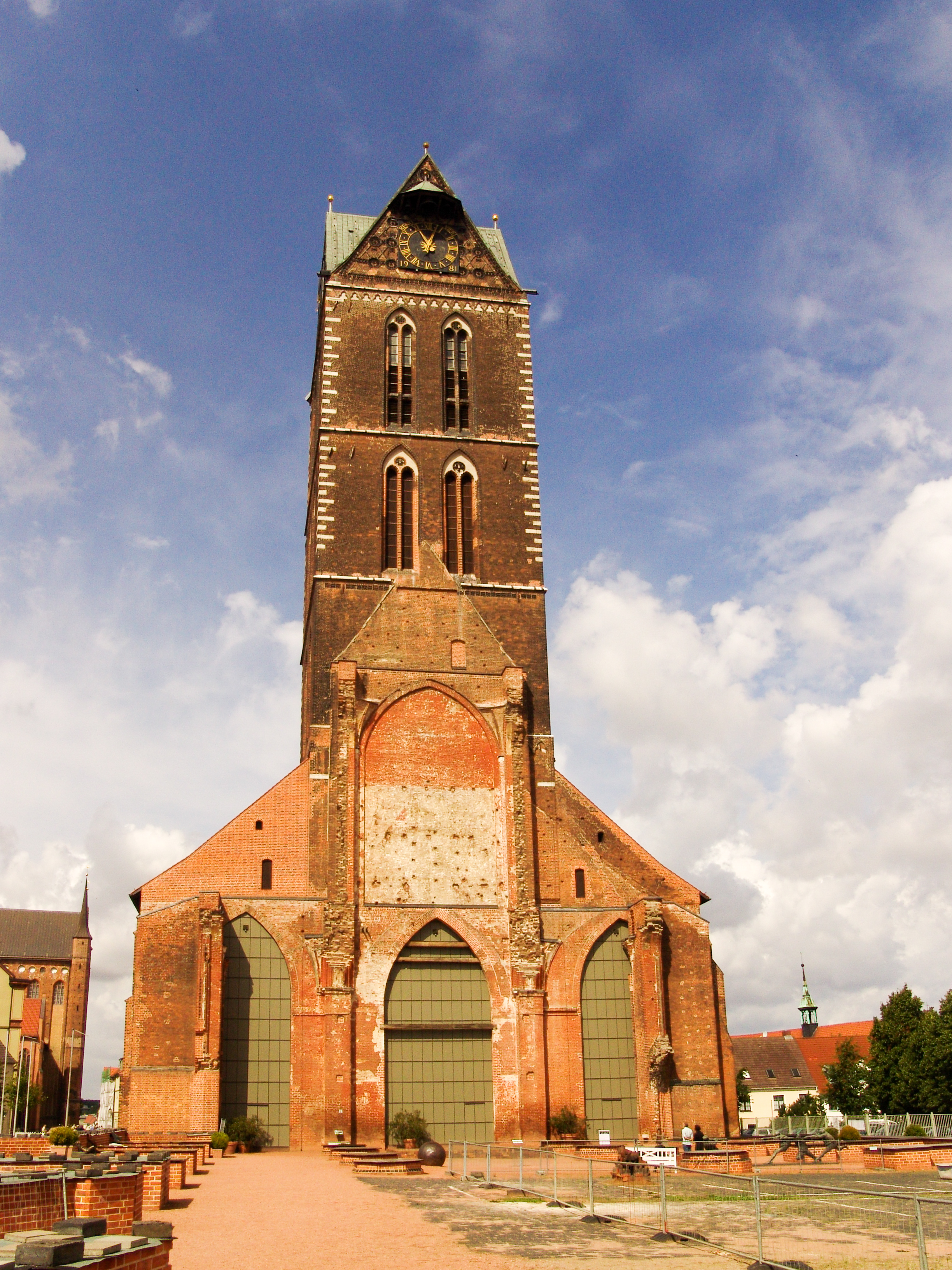 St. Marien Wismar